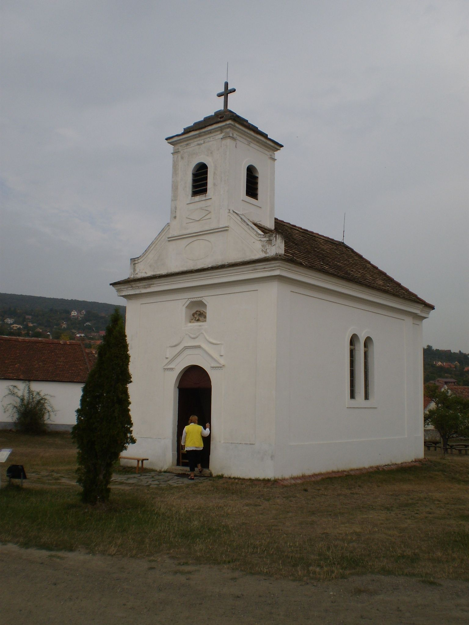 Fogadalmi kápolna, Jánossomorja (Mosonszentjános) a szentendrei skanzenben